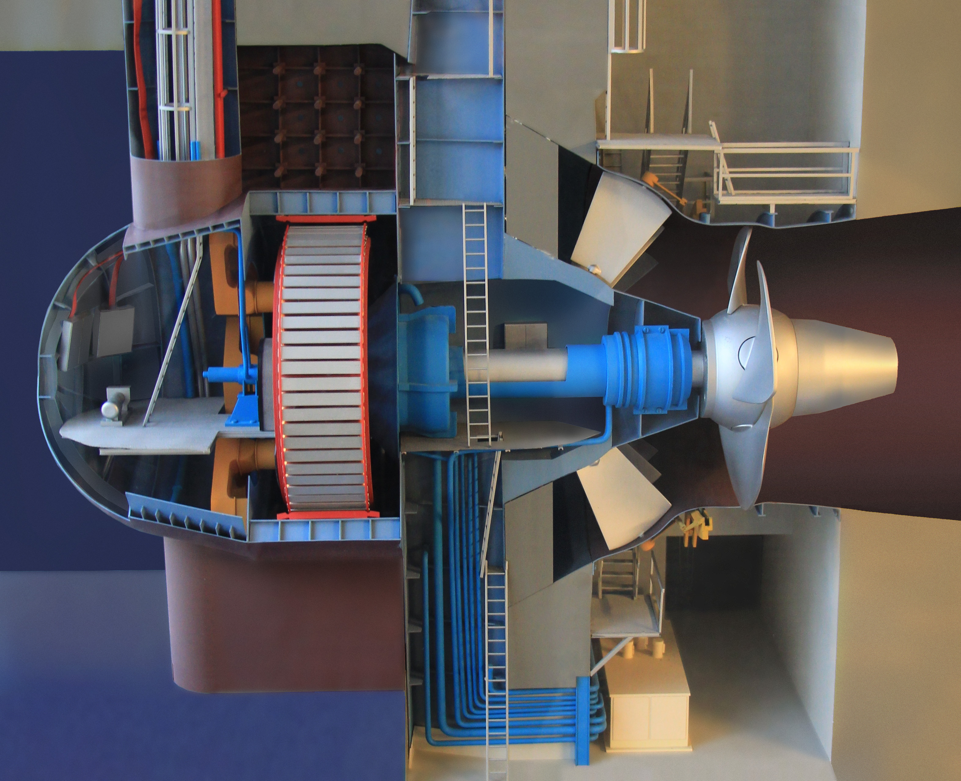 Modell der Maschine 7 (Kaplanrohrturbine) des Donaukraftwerkes Ybbs-Persenbeug